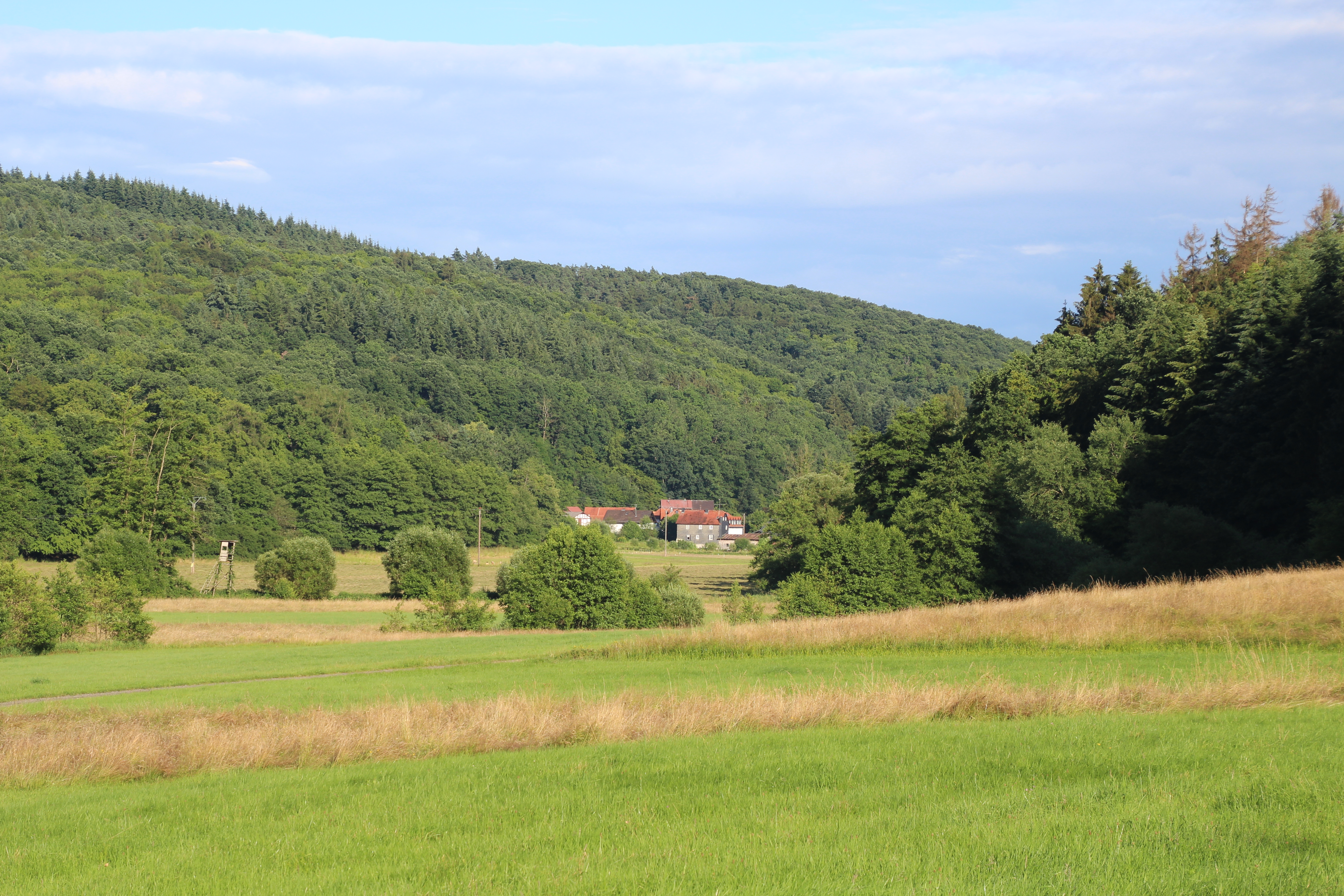 Siehe Foto